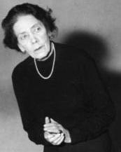 23.1.1959 West-Berlin Mary Wigman-Studio, Englische Meisterschülerin links: M. Wigman